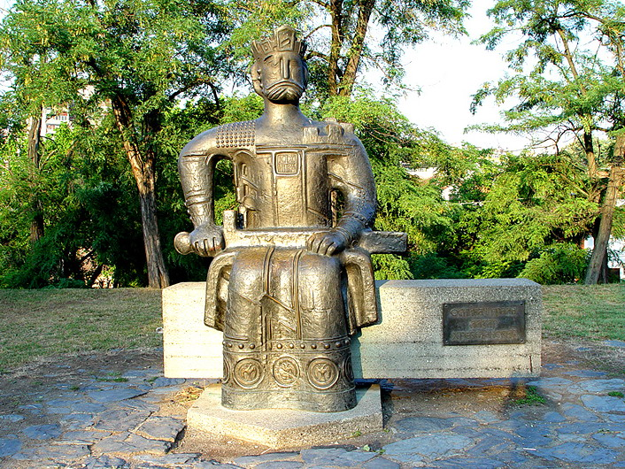 Lazar Hrebeljanović's statue in Kruševac, Serbia/La statue du prince Lazar à Kruševac, Serbie